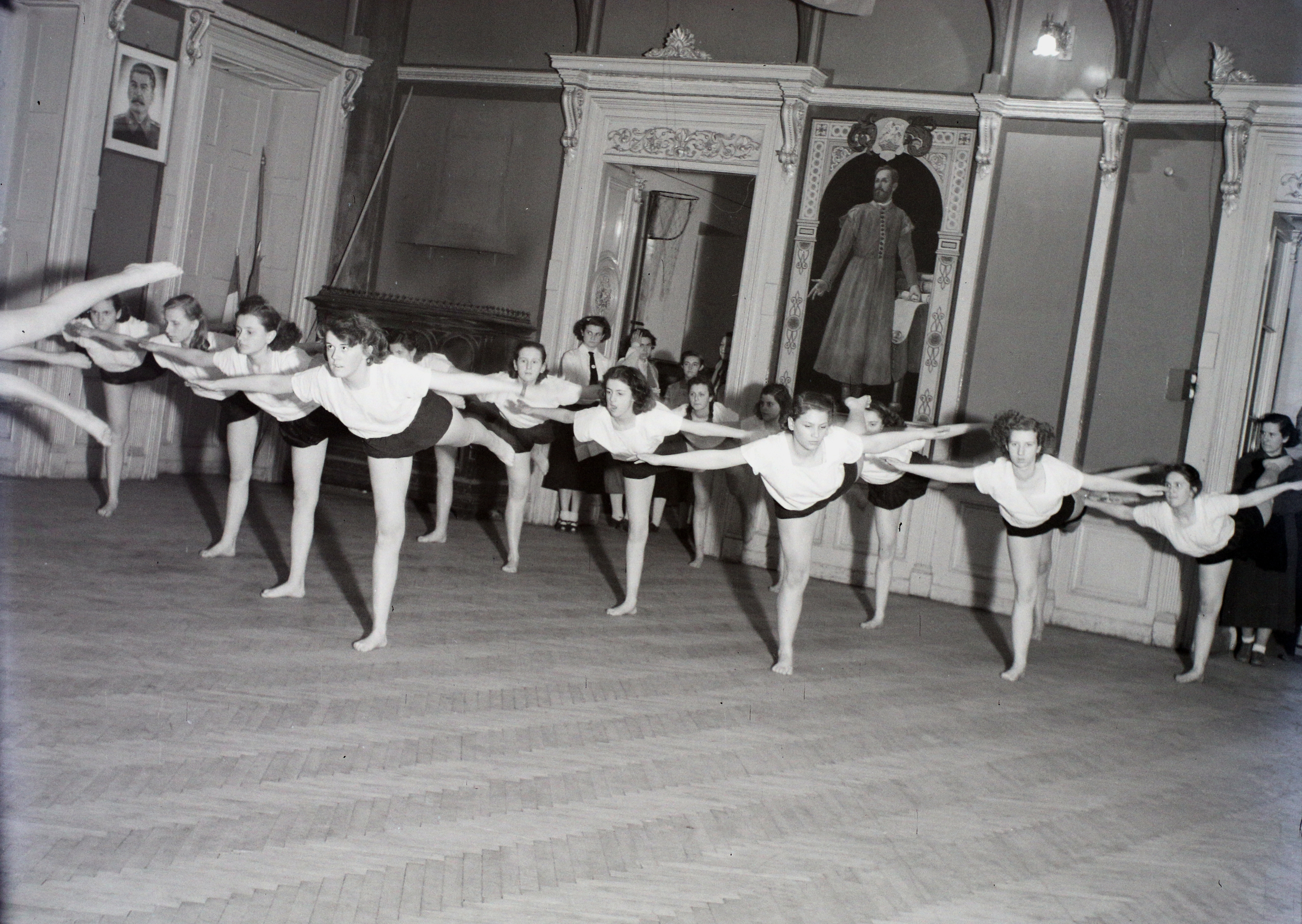 Sütő utca 1., a Deák Téri Evangélikus Gimnázium díszterme. Location: Hungary, Budapest V. Tags: Budapest, female gymnast, parquet floor, István Illésházy-portrayal Title: Sütő utca 1., a Deák Téri Evangélikus Gimnázium díszterme.